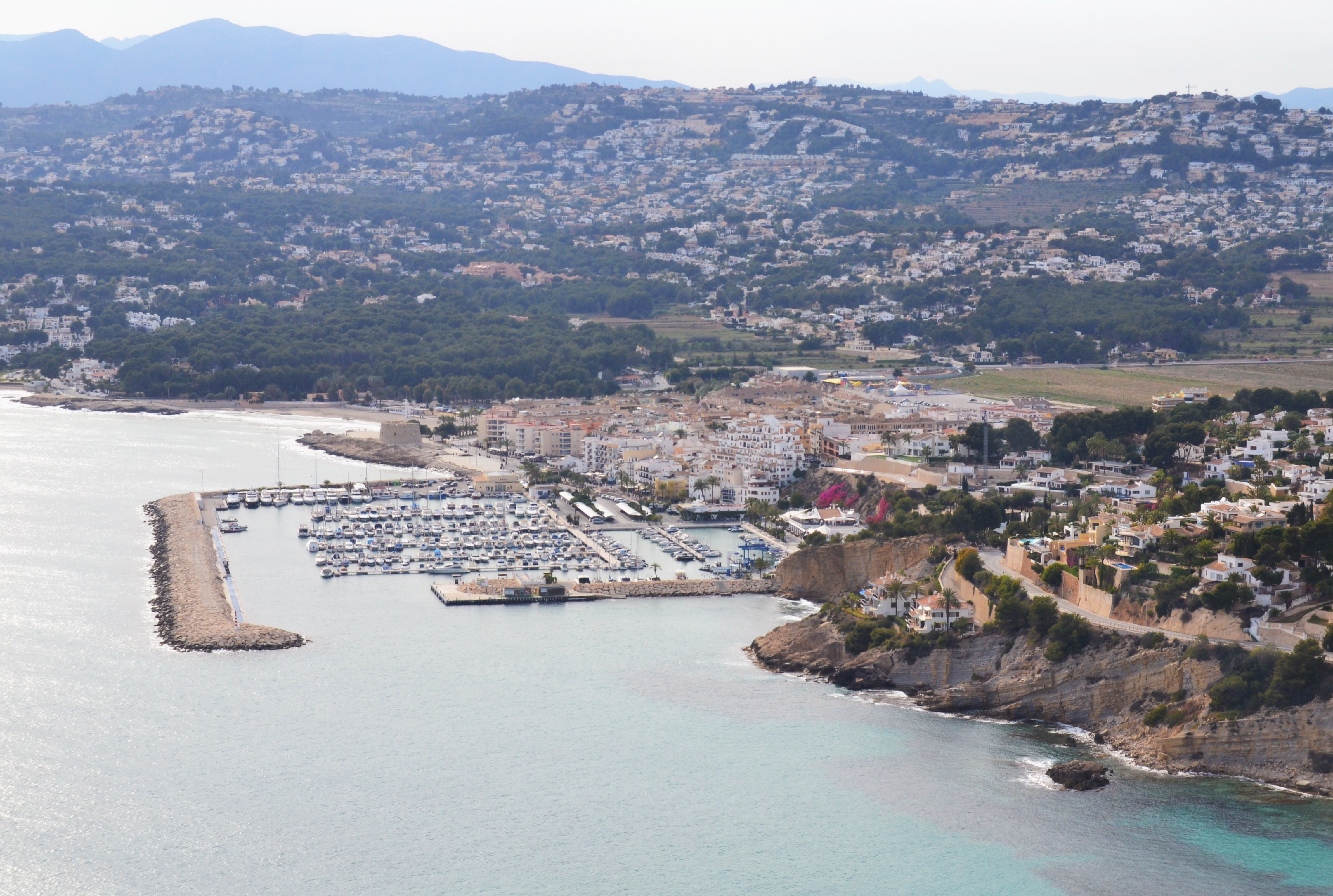 Vista de Moraira des del Cap d'Or.